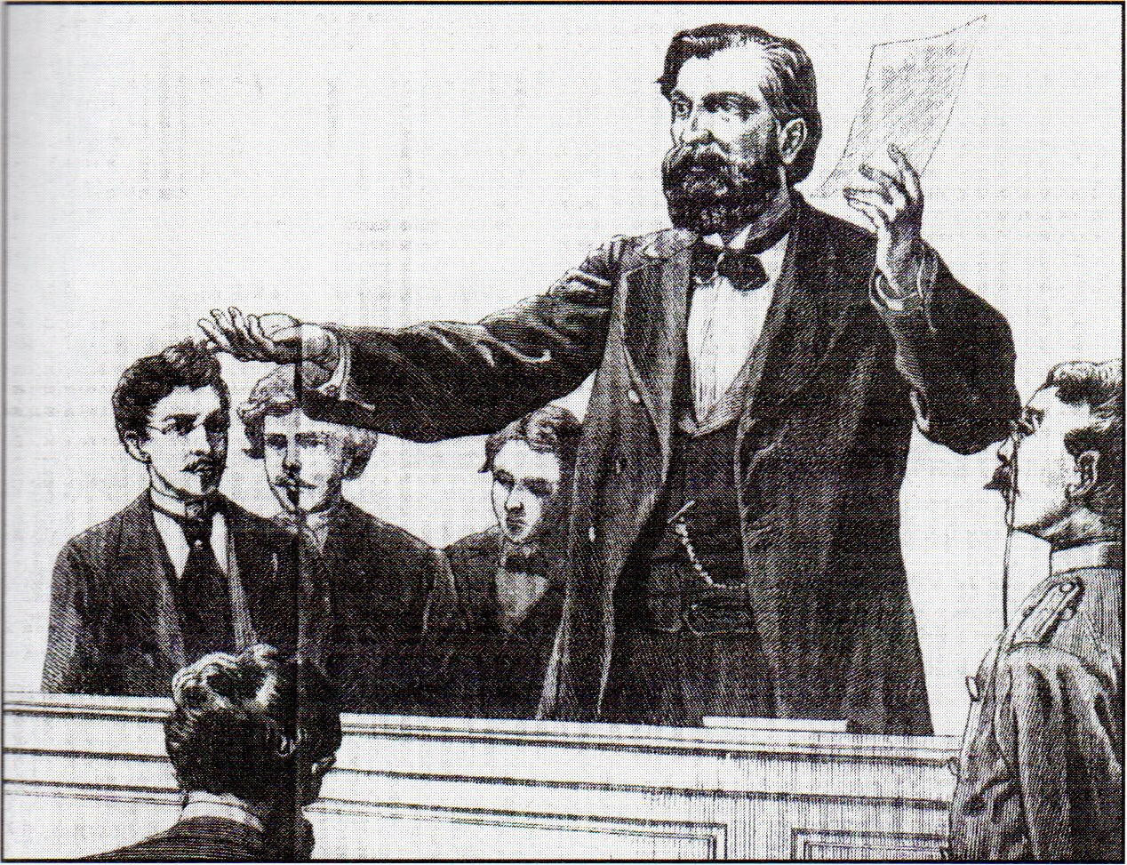 Untertitel_ Leitfigur des deutschen Bürgertums - der Historiker Heinrich von Treitschke im Hörsaal (1879)